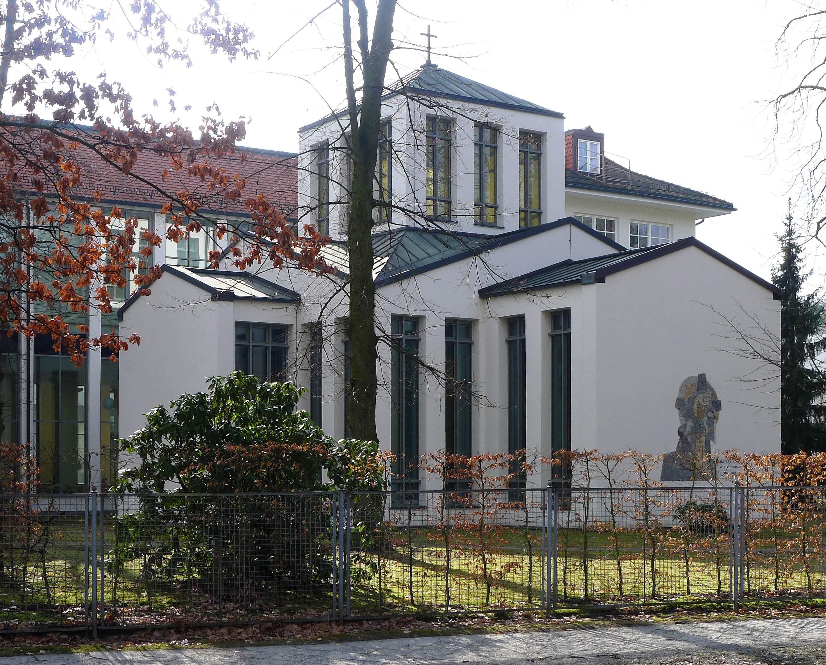 Blick auf die Kapelle von der Altvaterstraße aus.